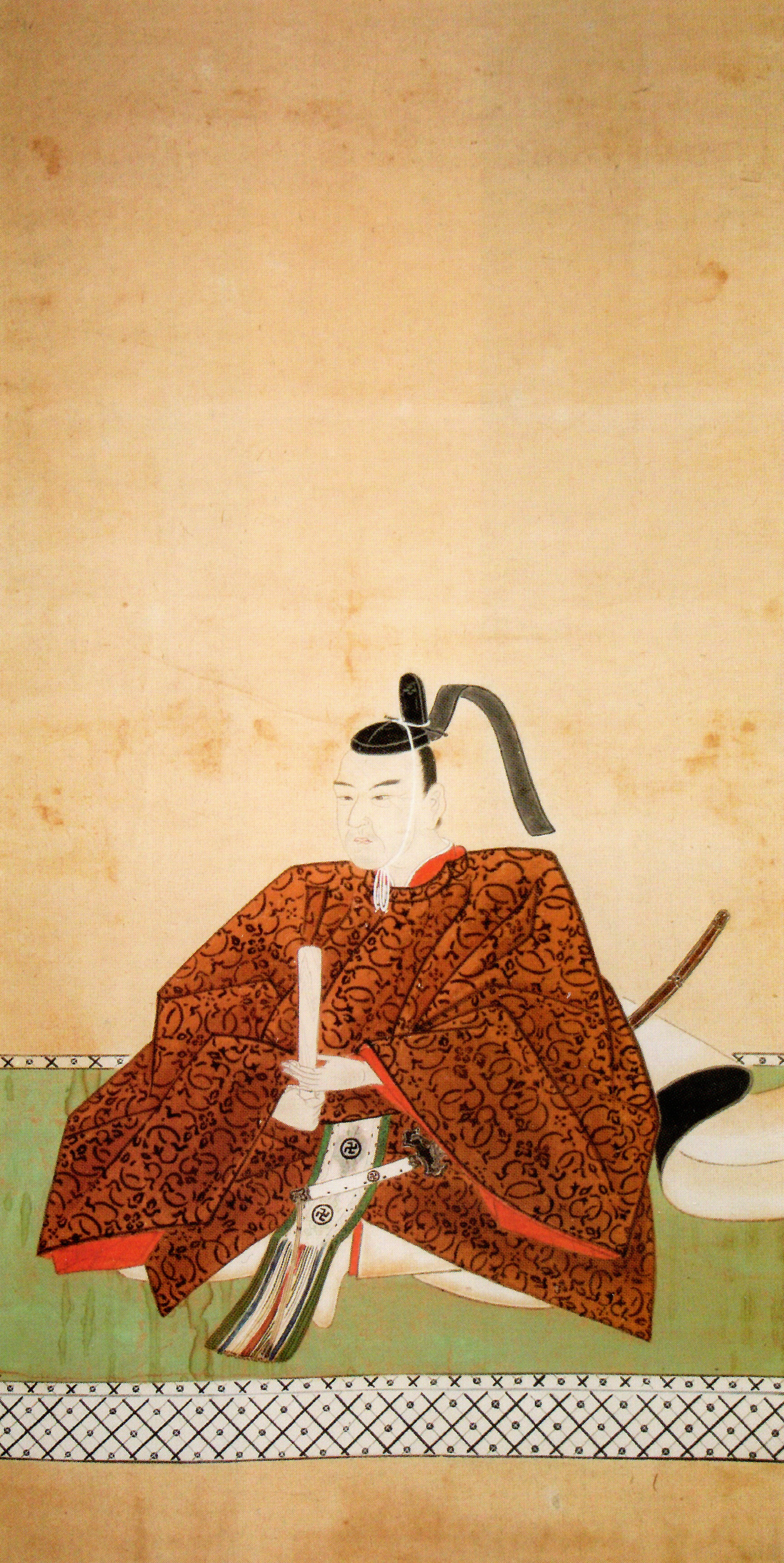 横山隆盛の肖像。